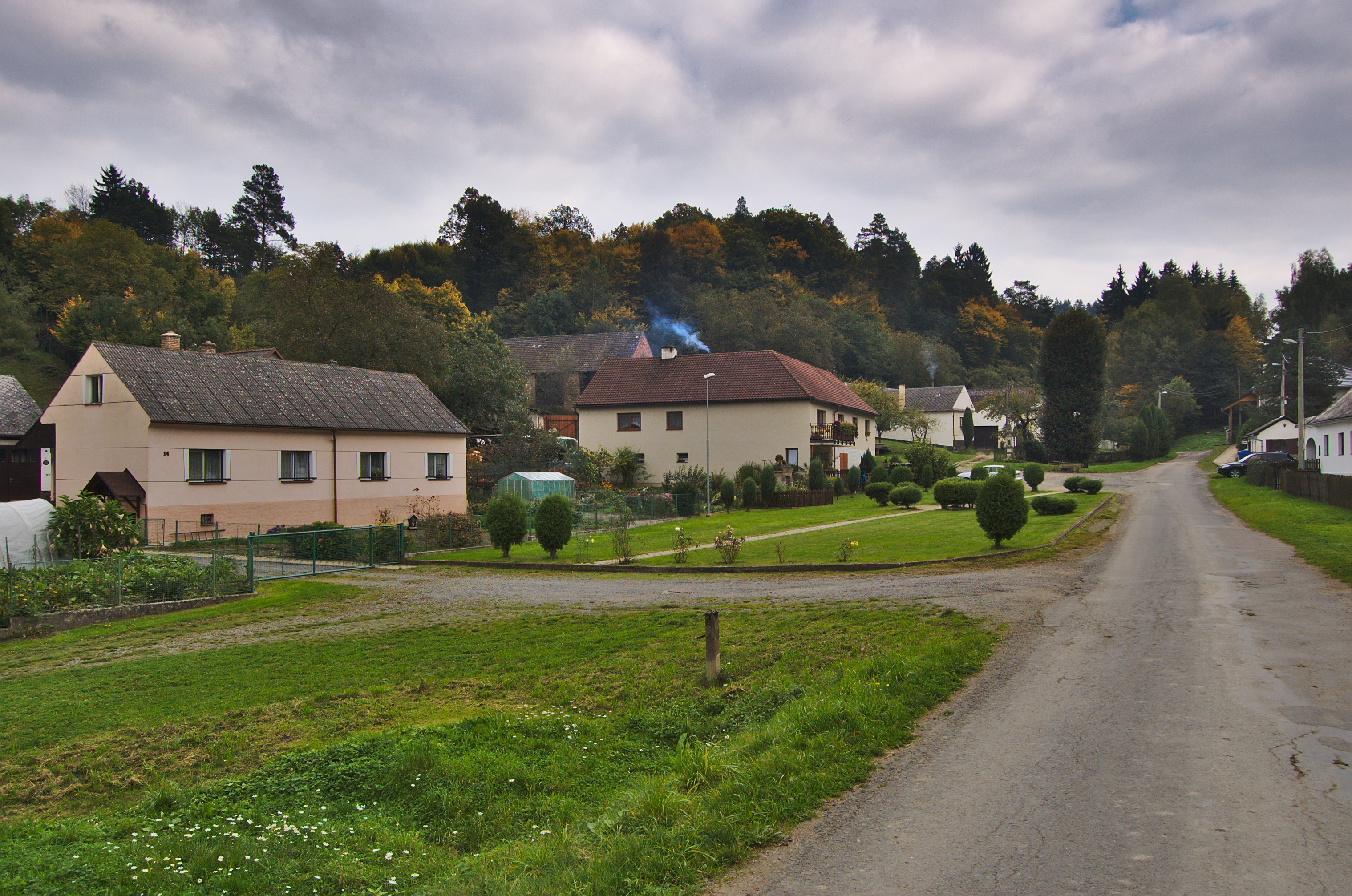 Náves, Stará Roveň, Městečko Trnávka, okres Svitavy